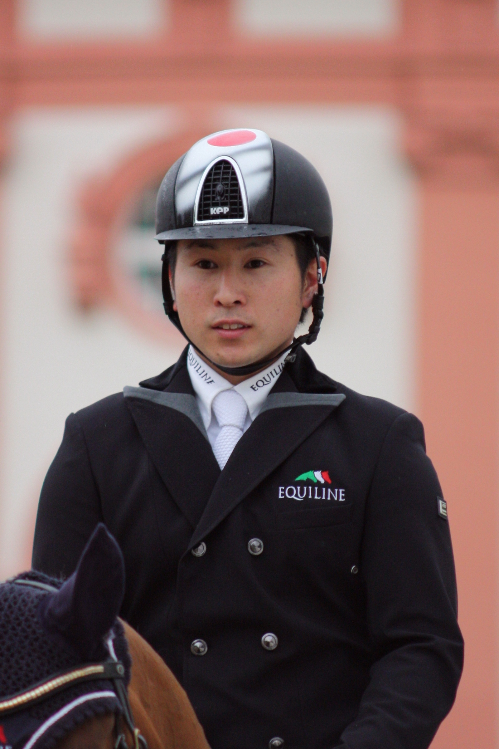 77. Internationanles Wiesbadener Pfingstunier 2013, CIC *** Vielseitigkeitsprüfung Dressur, Kenki Sato Personality rights warning Although this work is freely licensed or in the public domain, the person(s) shown may have rights that legally restrict certain re-uses unless those depicted consent to such uses. In these cases, a model release or other evidence of consent could protect you from infringement claims.